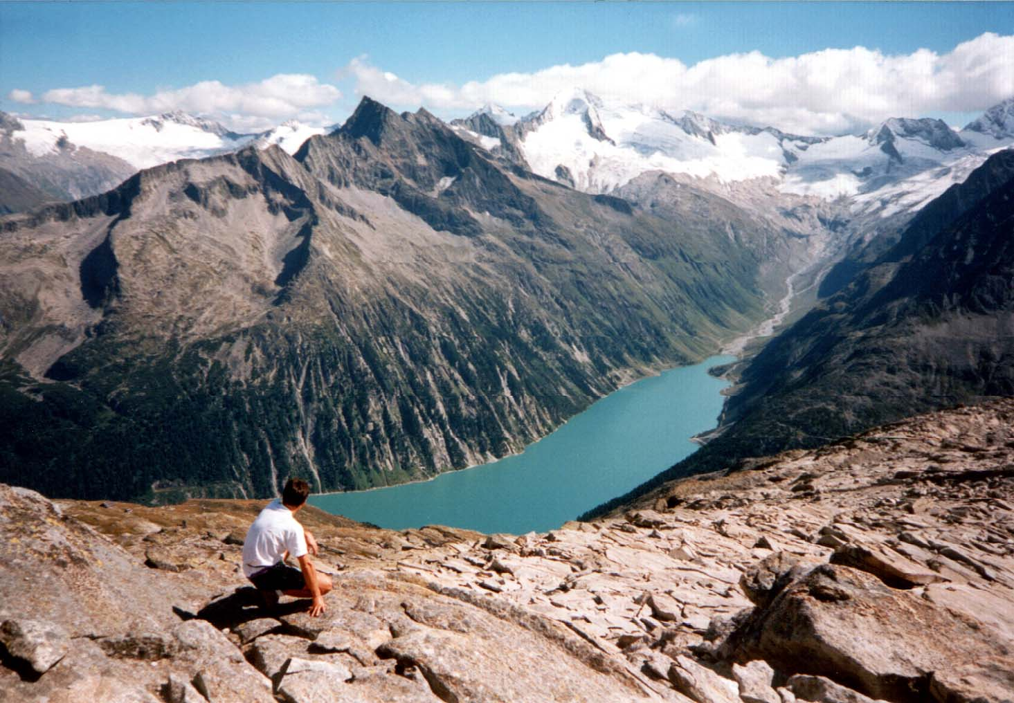 Blick auf den Schlegeisspeicher, Zillertaler Alpen. Gegenüber der Große Greiner, 3201 m